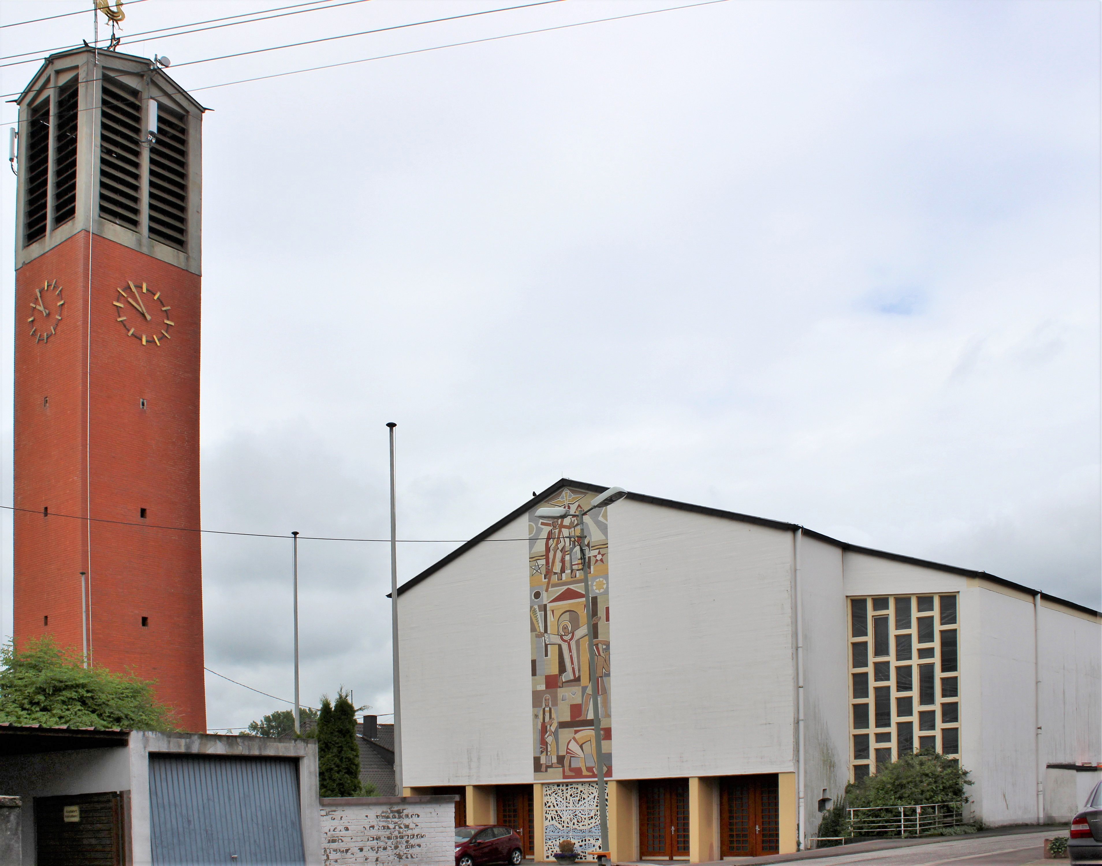 Die katholische Pfarrkirche St. Stephanus in Schmelz, Landkreis Saarlouis, Saarland